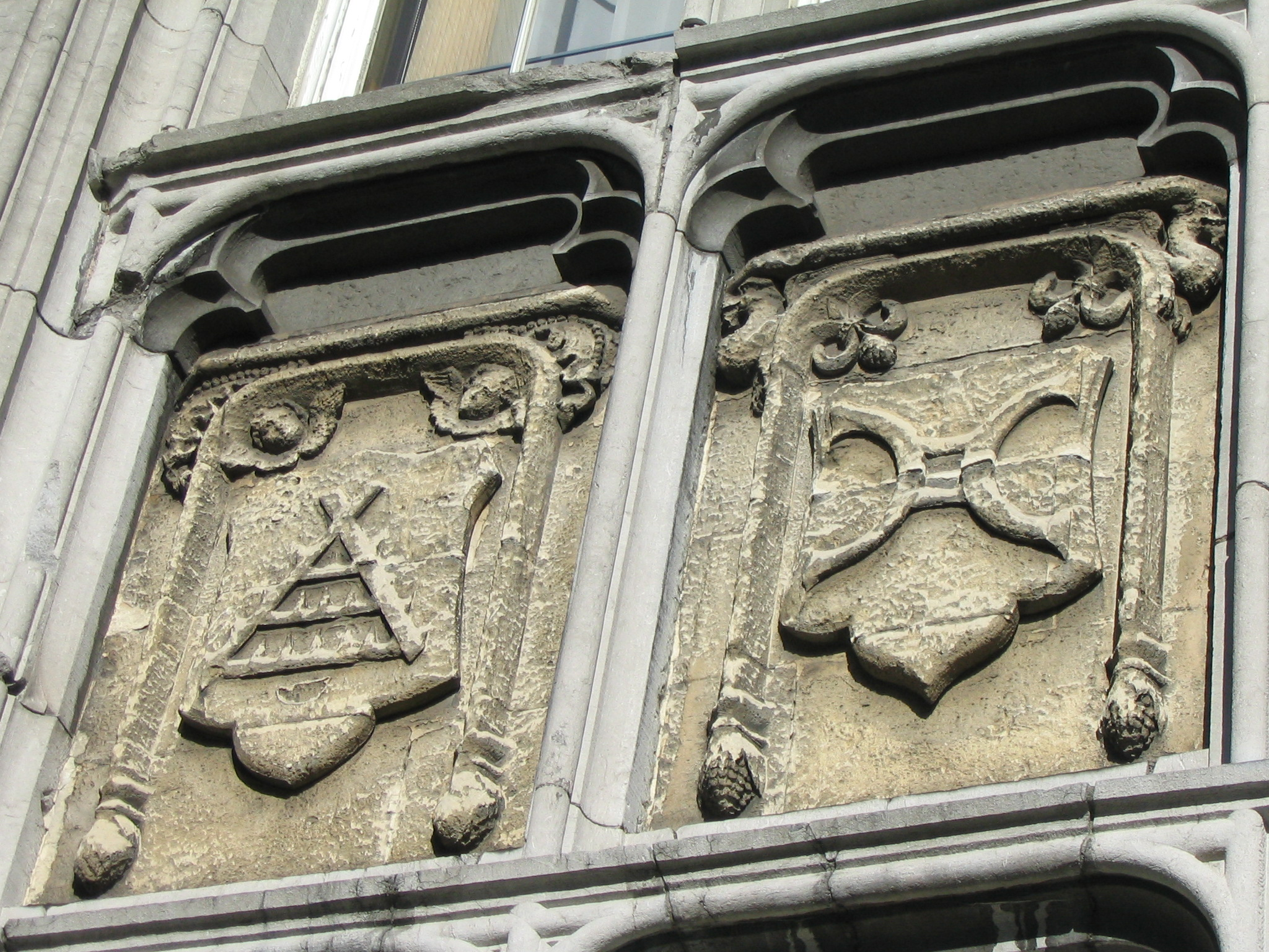 Panneau représentant deux des Trente-deux métiers de Liège sur la façade néogothique du Palais des Princes-Évêques de Liège